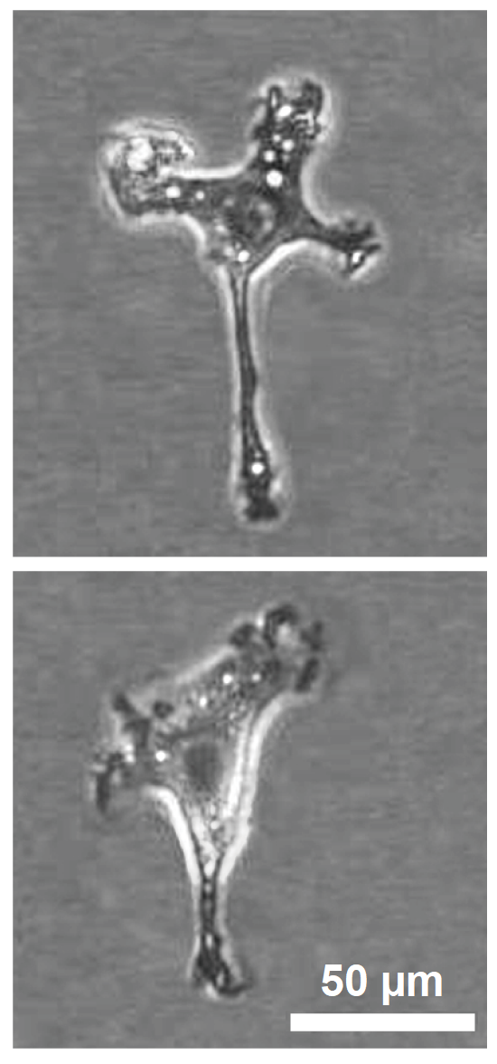 Figura 1.Trayectoria de arrastre de células MG5. Imágenes mostrando la forma típica ameboide de células de microglía MG5